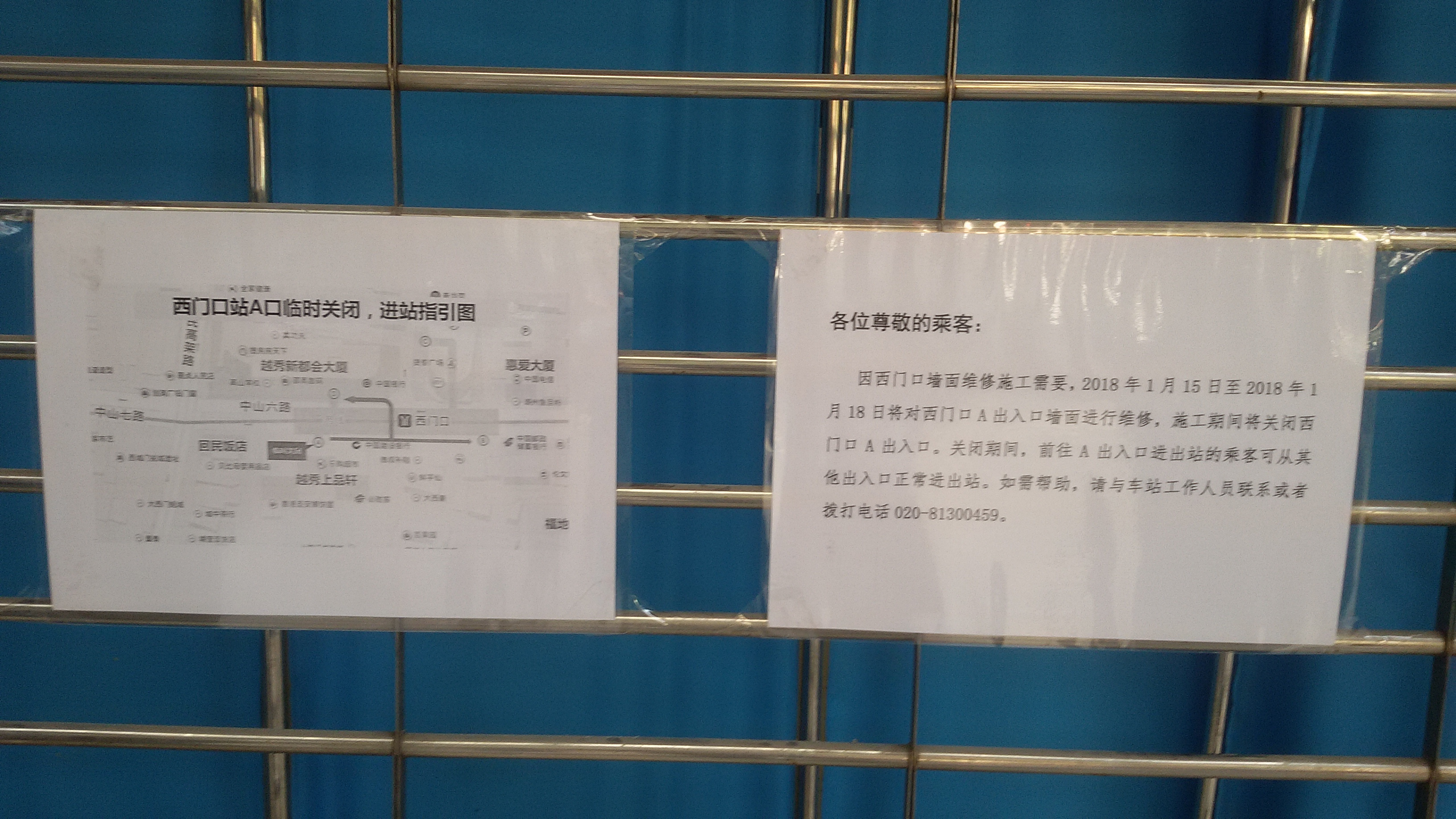 粵語: 廣州地鐵西門口站A出入口試過因為牆面搞裝修而喺2018年1月15～18號閂咗門三日